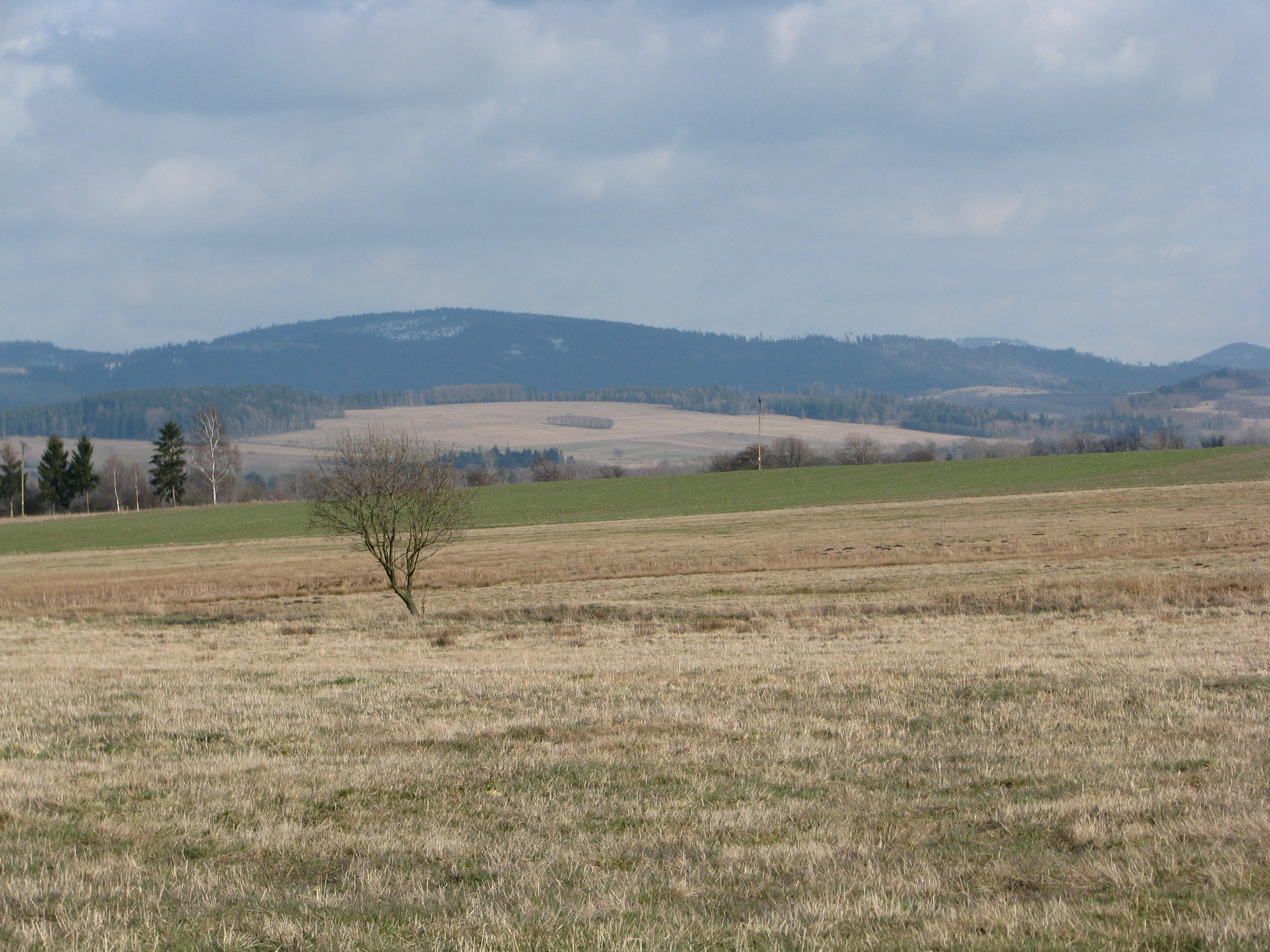 Czerep